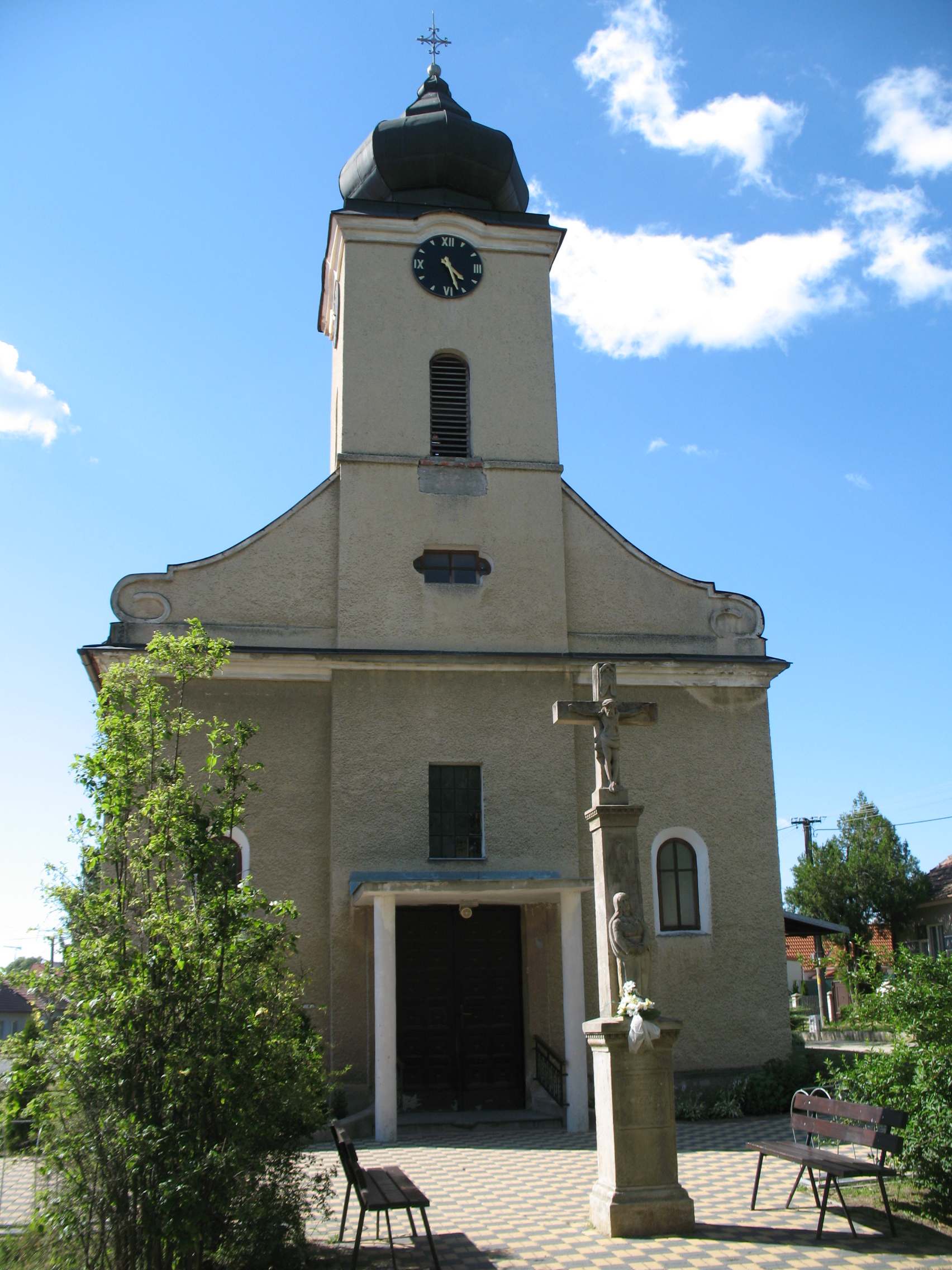 Décskelecsény